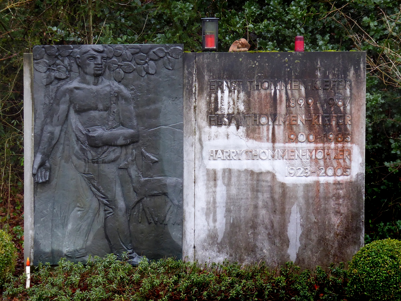 Ernst Thommen-Kiefer (1899–1967) Captain und Funktionär des FC Breite Basel, Fussballfunktionär, Mitglied des Fifa-Exekutivkomitees, Familiengrab auf dem Friedhof Hörnli, Riehen, Basel-Stadt